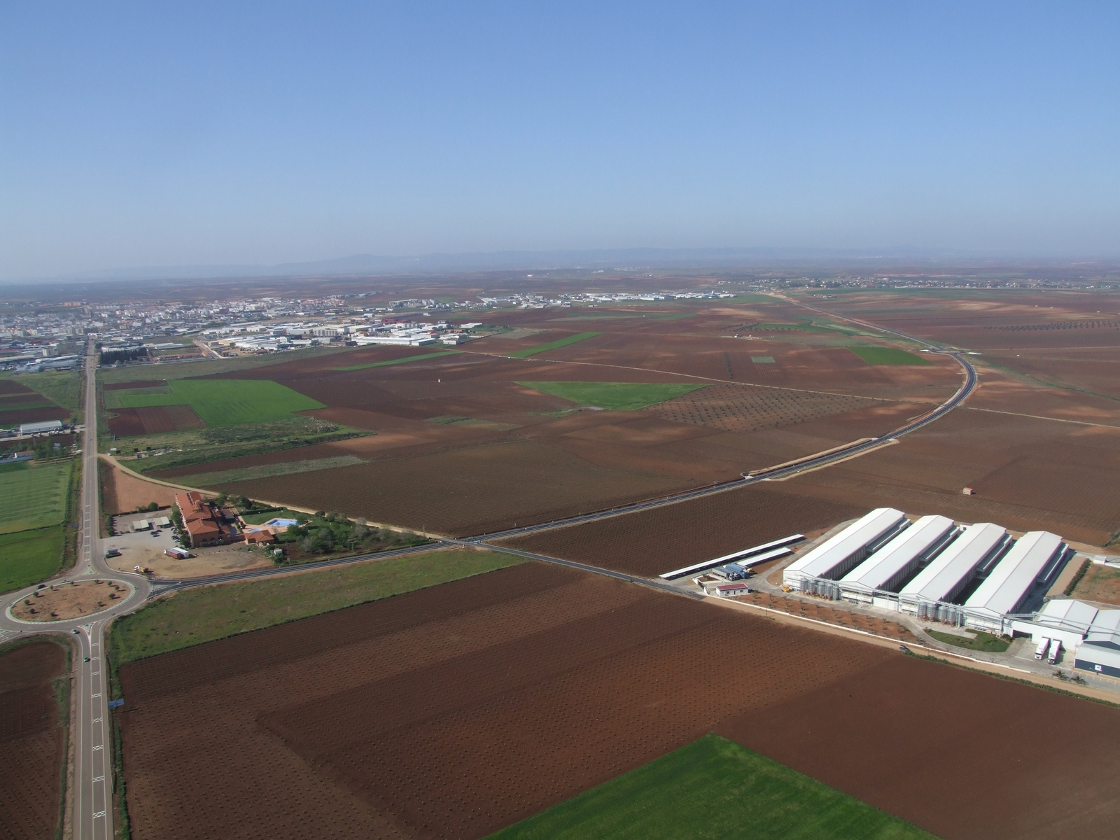 Vista panorámica de la circunvalación oeste de Almendralejo (EX-359) en su tramo norte.